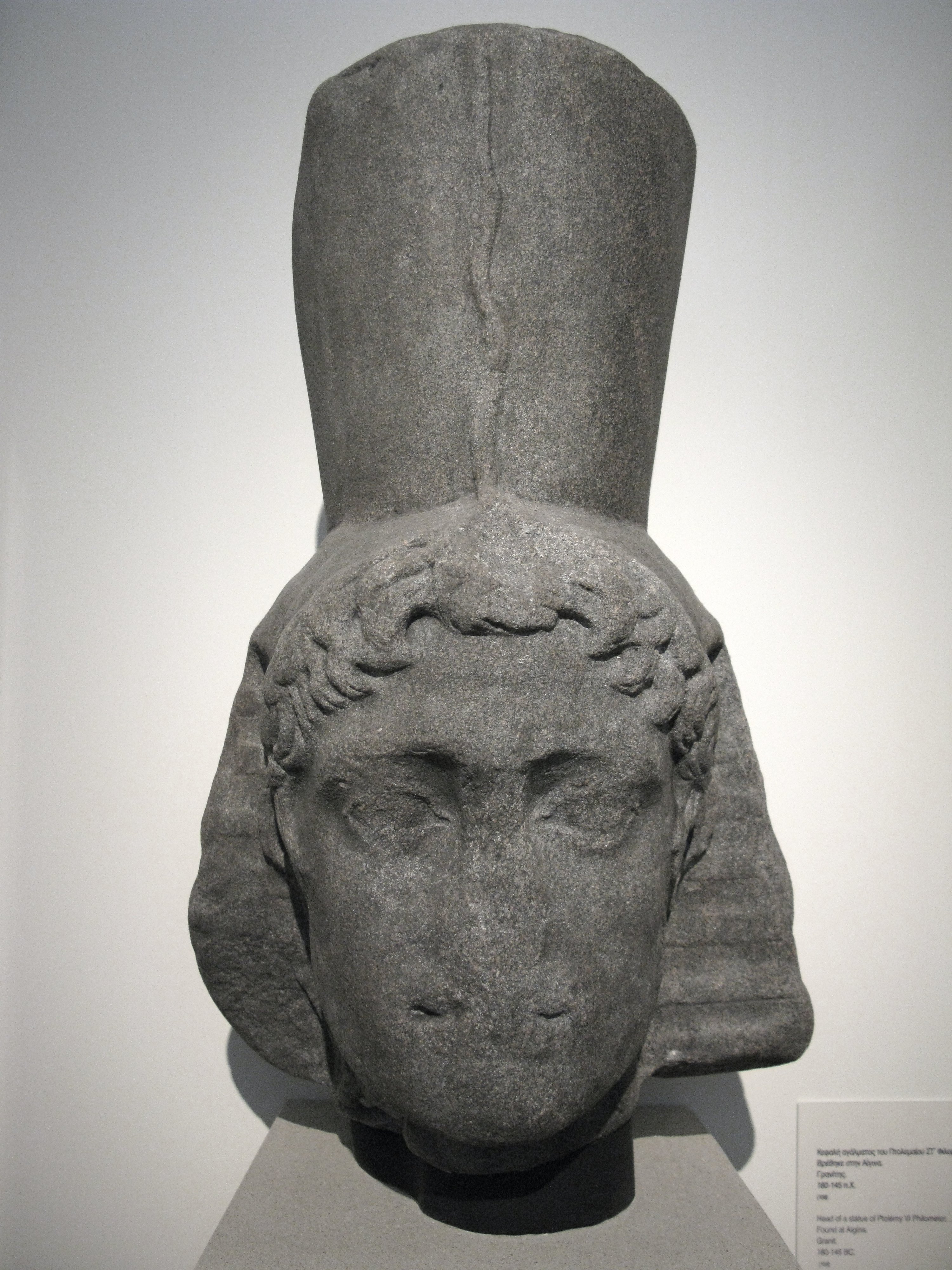 Egyptian Artifacts. National Archaeological Museum, Athens, Greece. --- Κεφαλή αγάλματος του Πτολεμαίου ΣΤ' Φιλομήτορος. Βρέθηκε στην Αίγινα. Γρανίτης. 180-145 π.Χ. Αιγυπτιακή συλλογή. Εθνικό Αρχαιολογικό Μουσείο. Αθήνα.